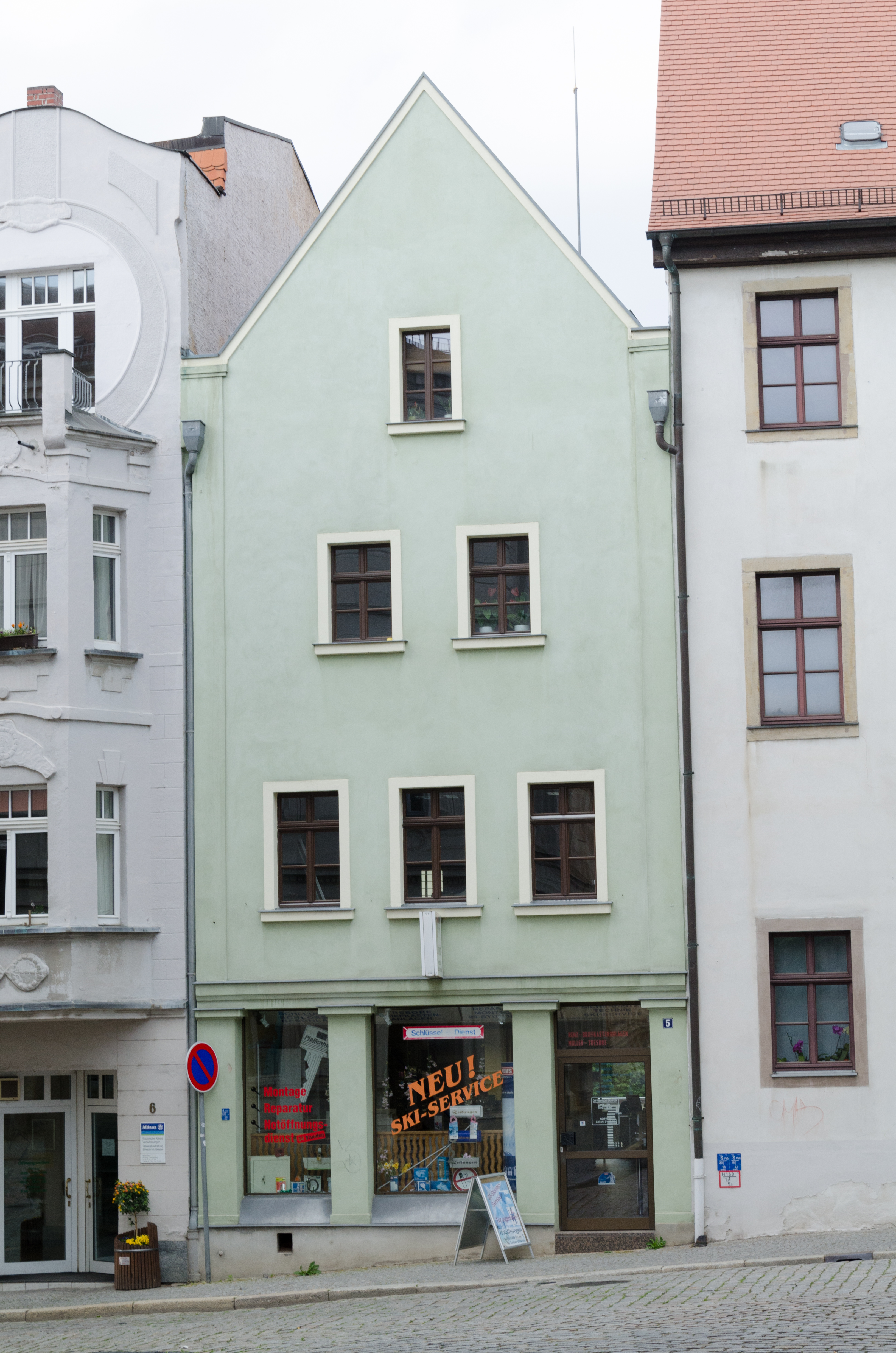 Zeitz, Brüderstraße 5